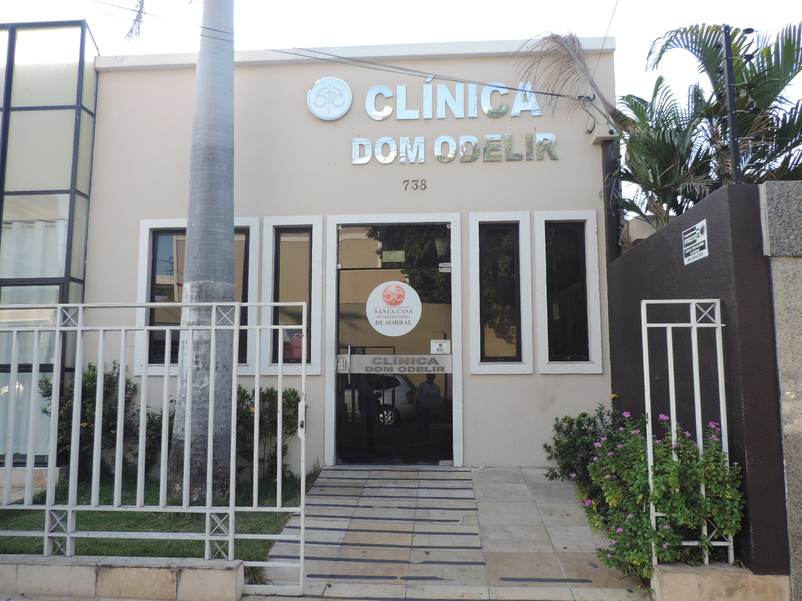 Fachada da Clínica Dom Odelir em Sobral